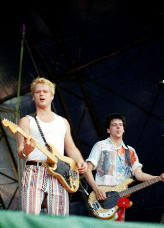 Die Toten Hosen: Gitarre (Andreas von Holst) und Bass (Andreas Meurer) der Toten Hosen, Konzert 1987 in Garching bei München.